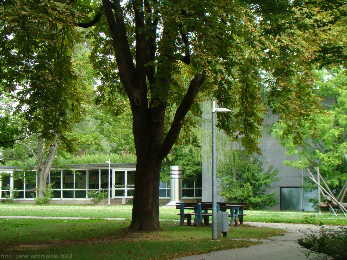 Blick in den Hof der Lindenparkschule in Heilbronn